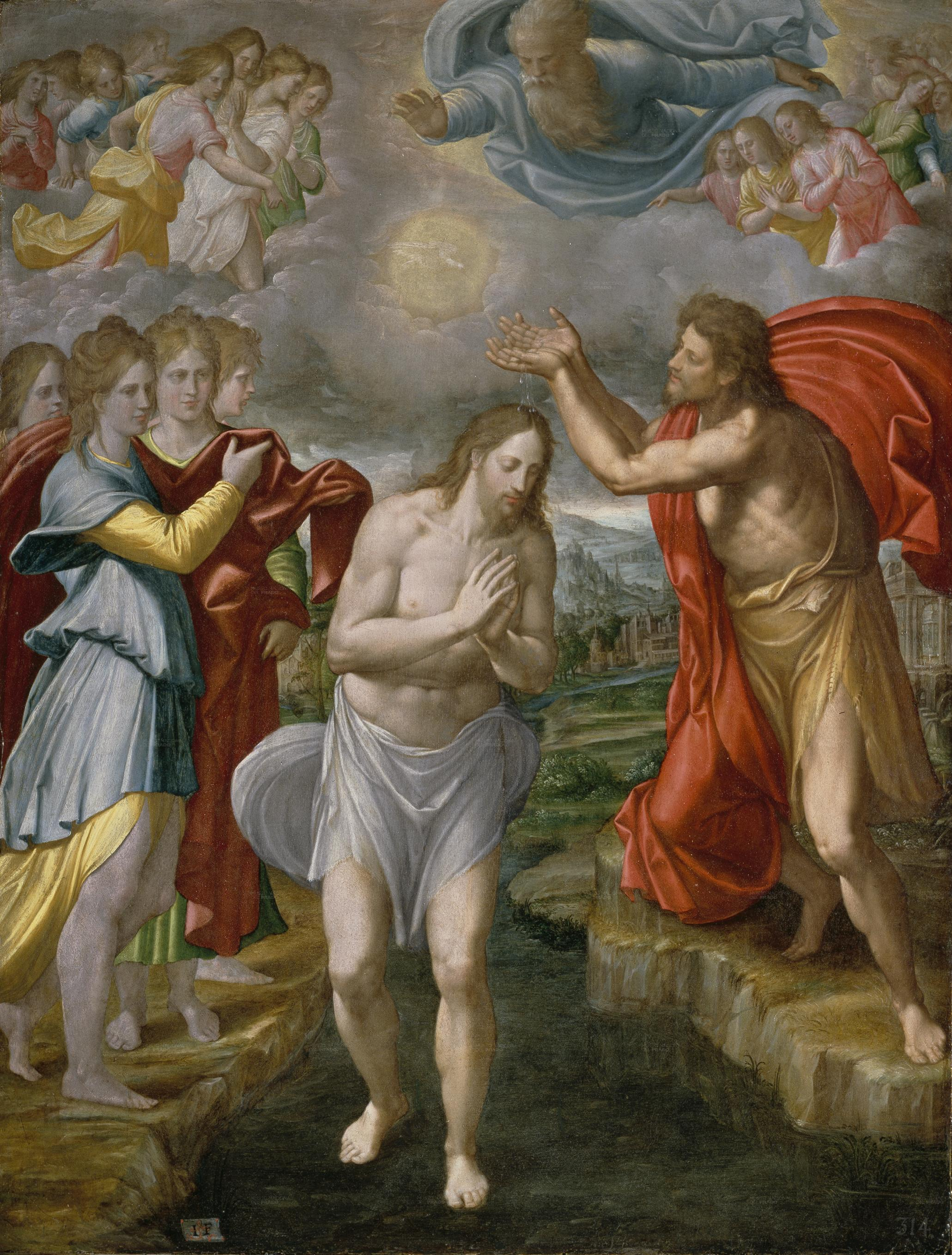 Bautismo de Cristo.title QS:P1476,es:"Bautismo de Cristo." label QS:Les,"Bautismo de Cristo."